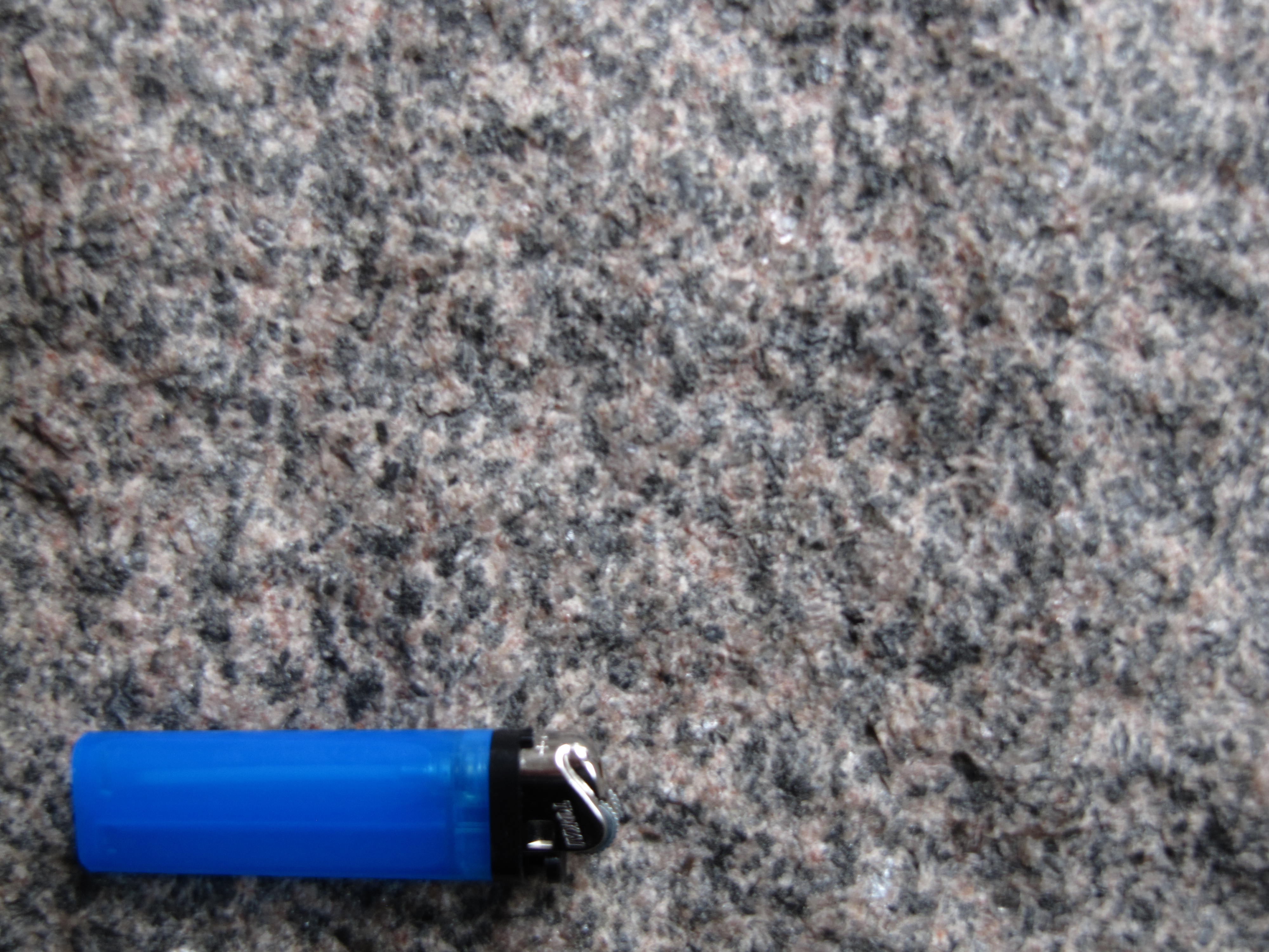 Hugget flade i Vang granit; lighter er 8 cm